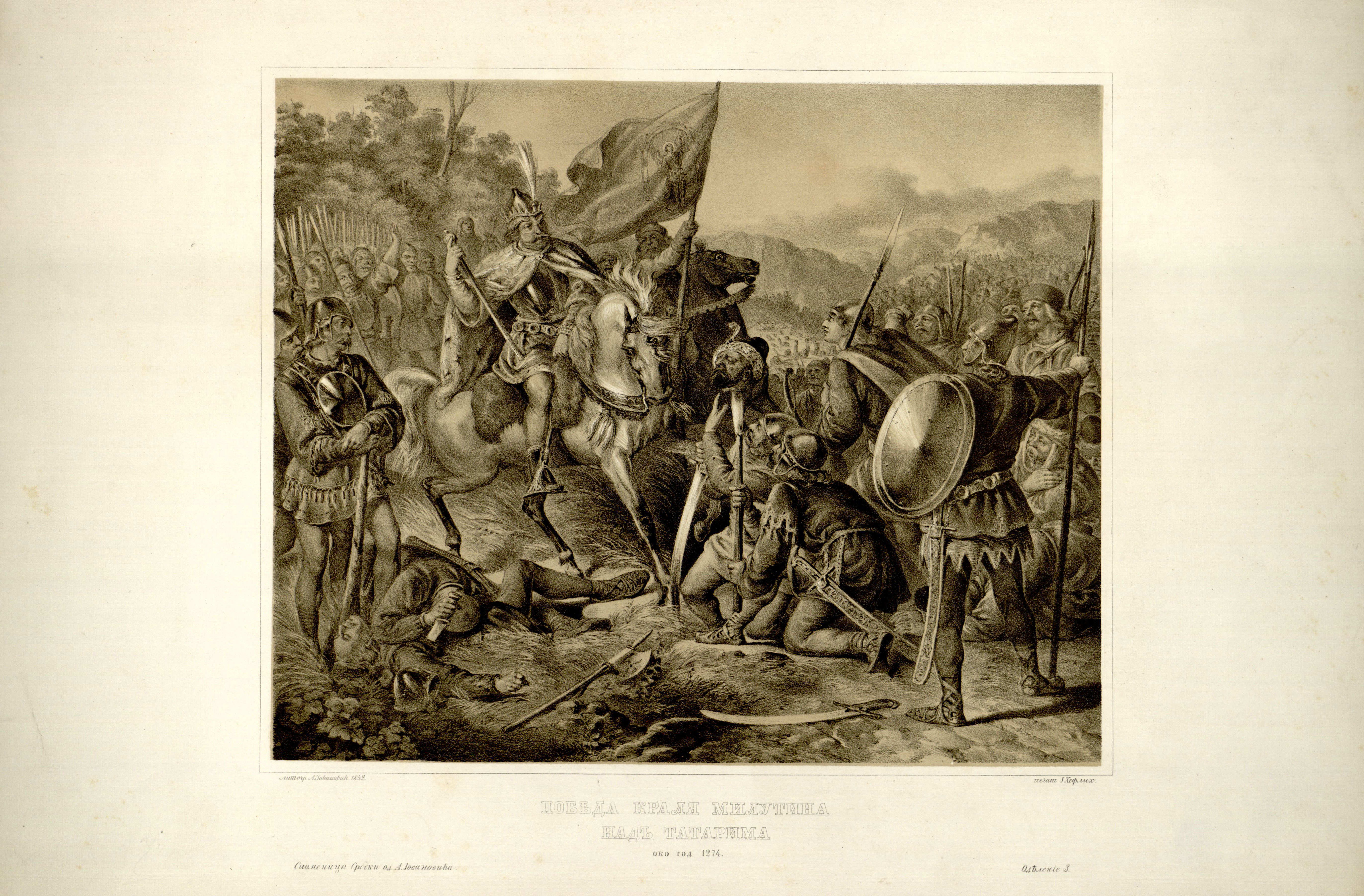 Lithograph of the victory of king Milutin over Tatars by Anastas Jovanović. Caption: литогр. А. Іовановић 1852.печат Ј. Хефлих. ПОБѢДА КРАЛЯ МИЛУТИНА НАДЪ ТАТАРИМА око год 1274. Споменици Србски од А. Іовановића.Одѣленіе 3.